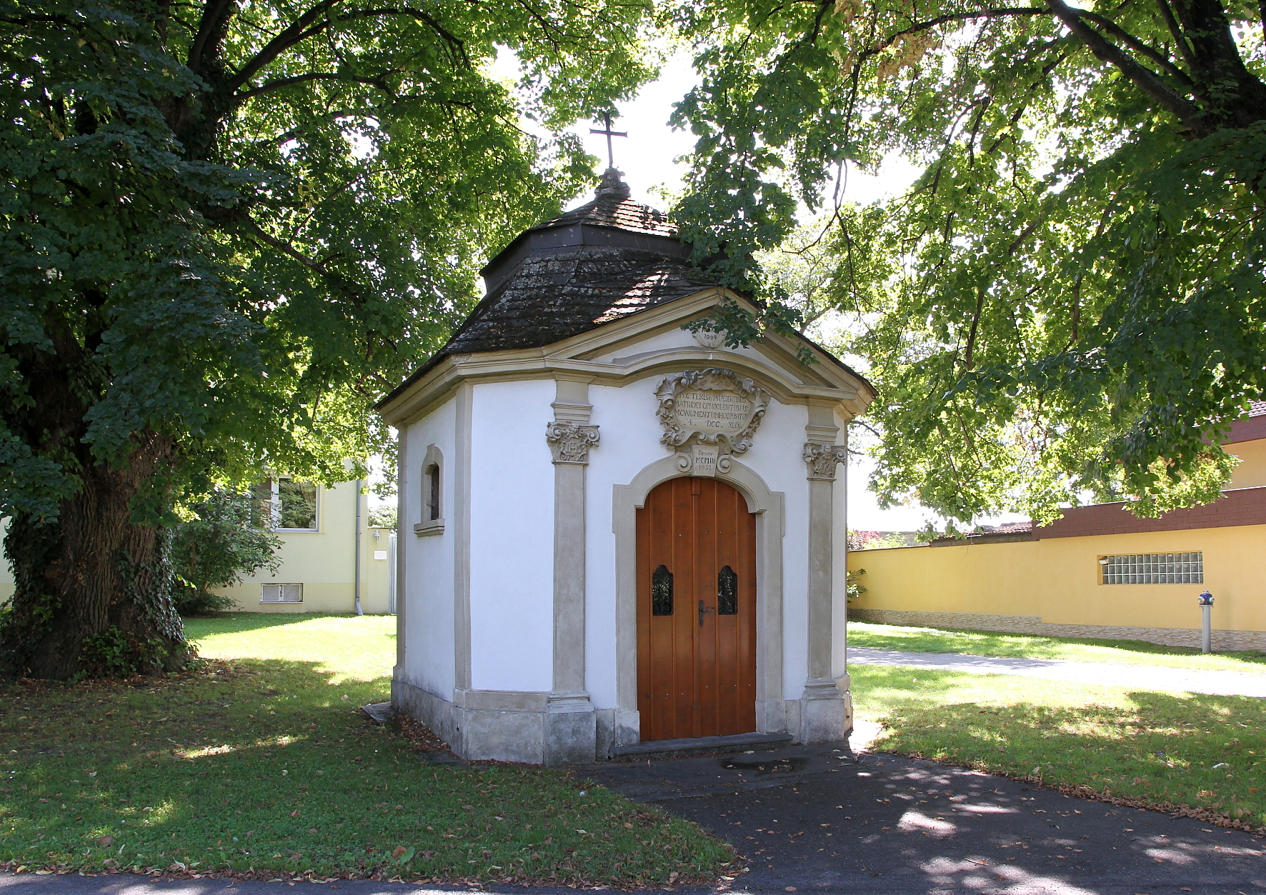 Die Graßkapelle in der burgenländischen Marktgemeinde Loretto.